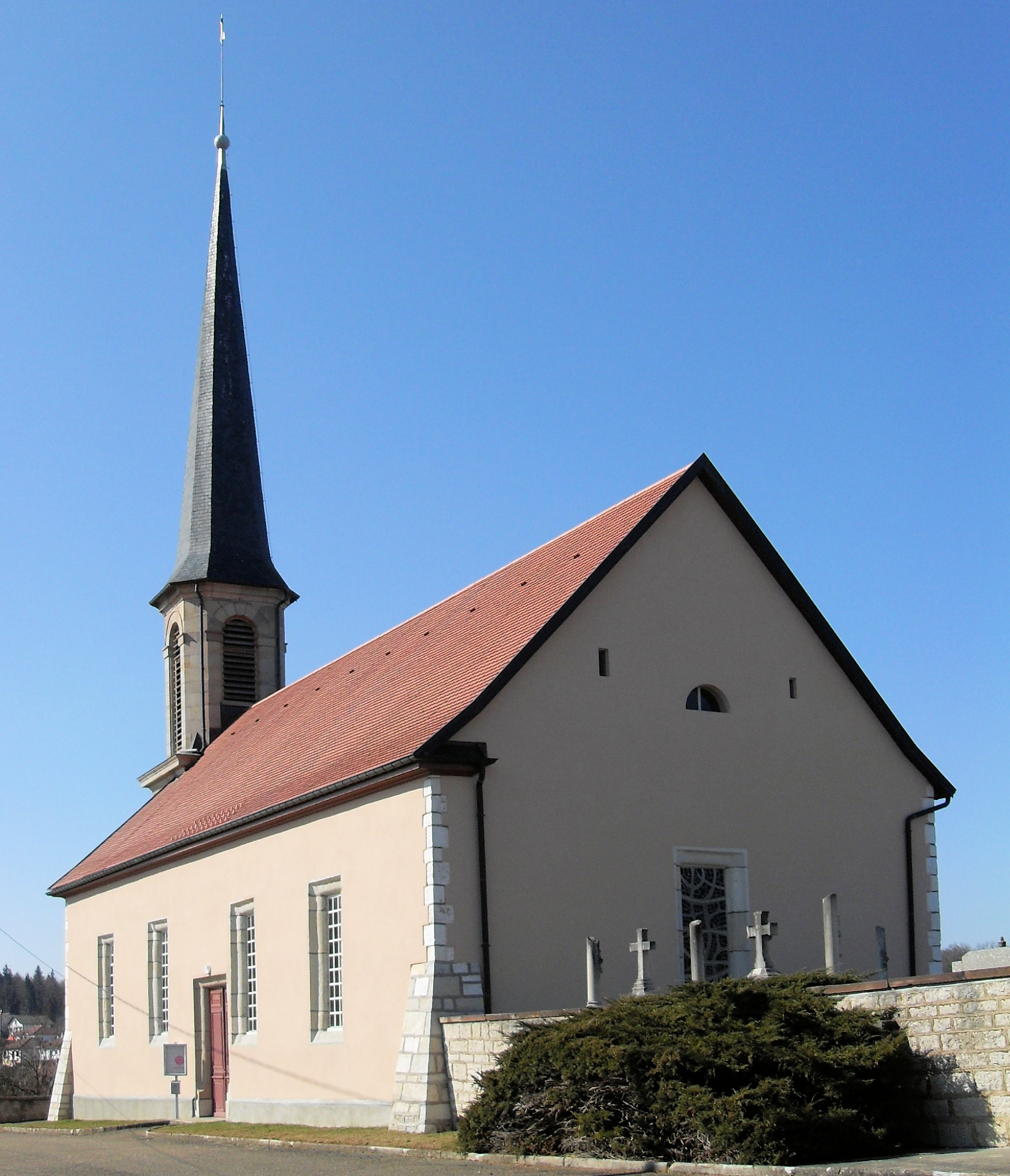 Le temple protestant à Dampierre-les-Bois